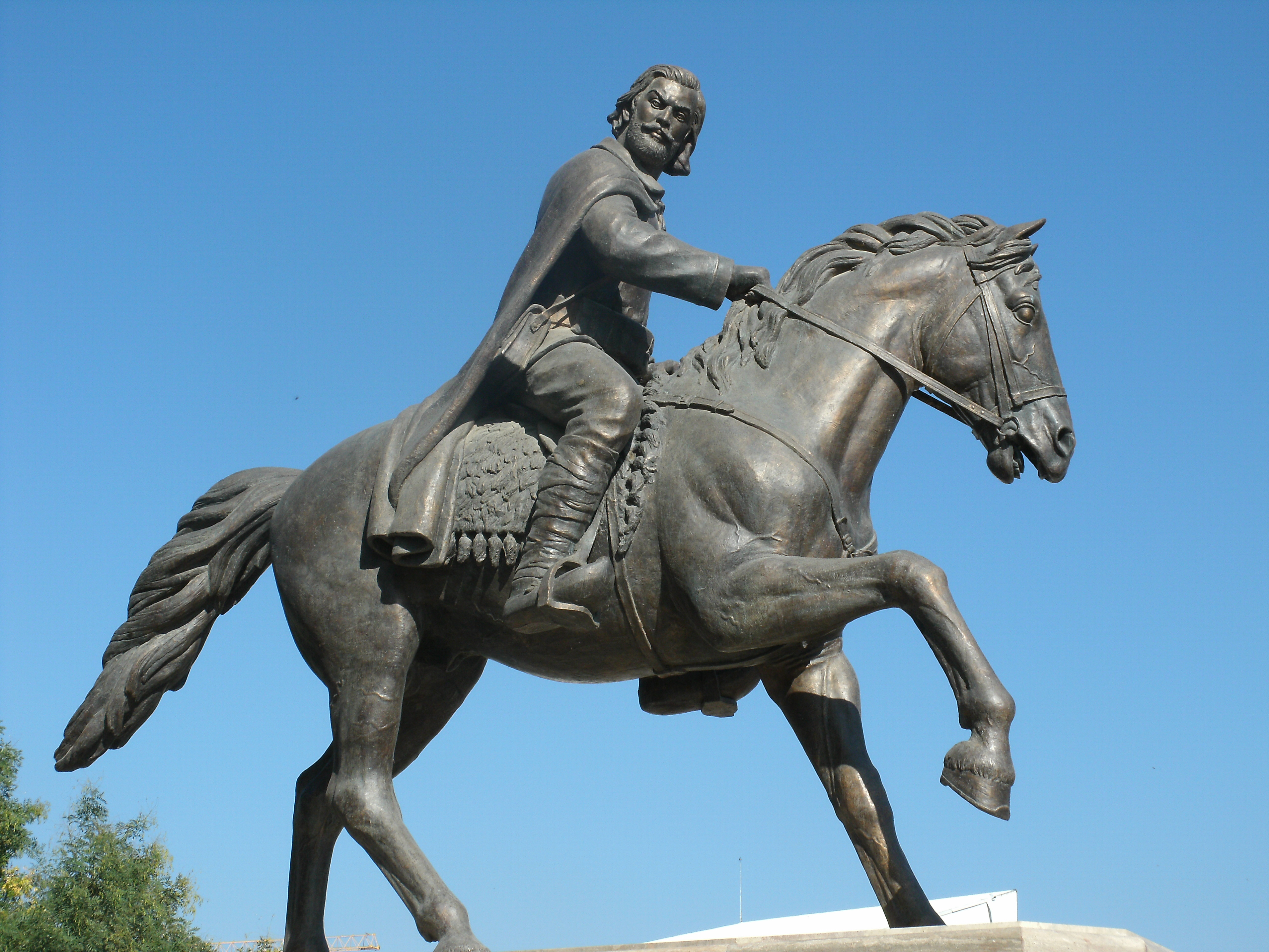 Spomenik na Bors Sarafov vo Skopje